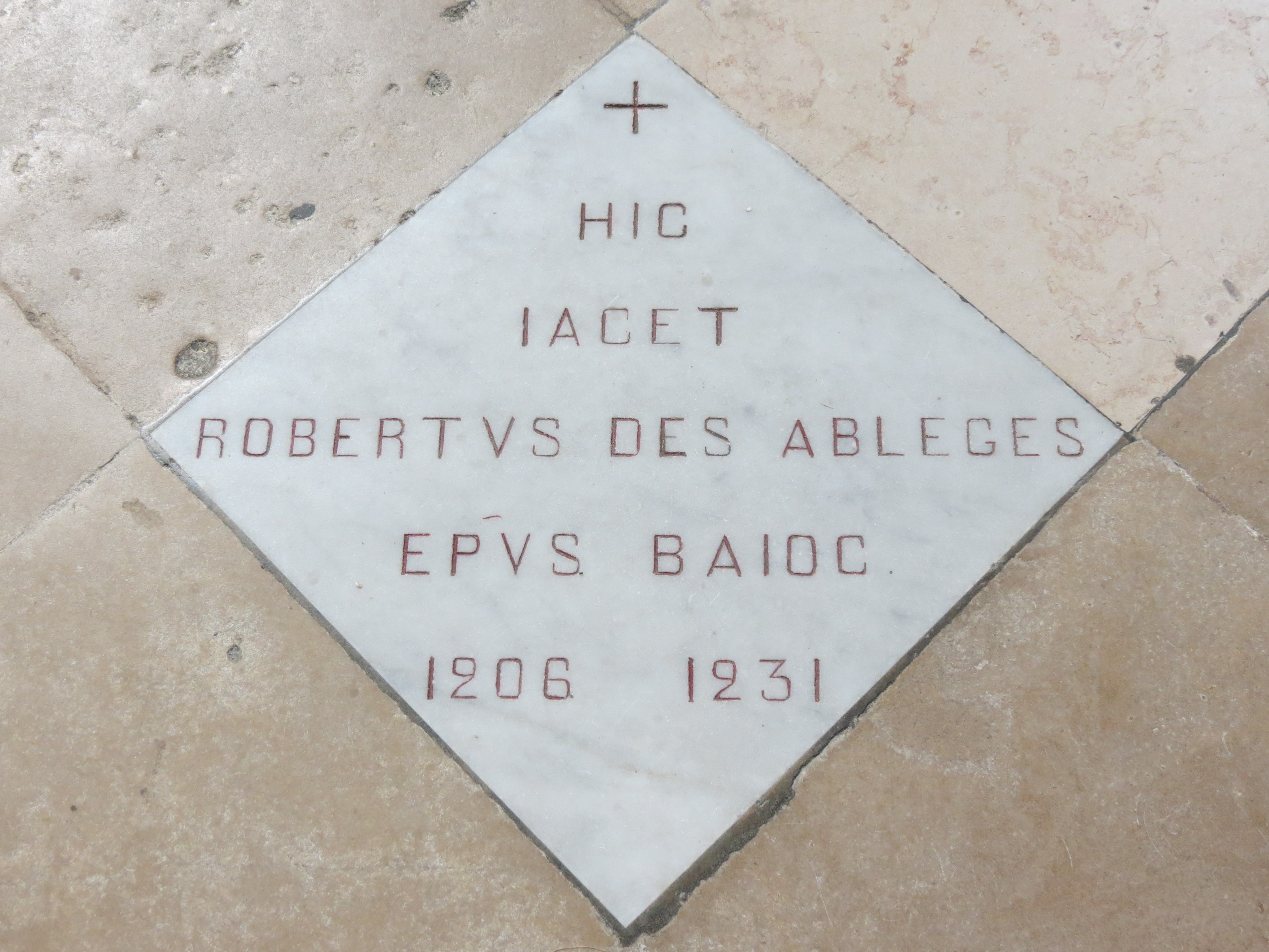 Pierre tombale de Robert des Ablèges, évêque de Bayeux (1206-1231), en haut de la nef.